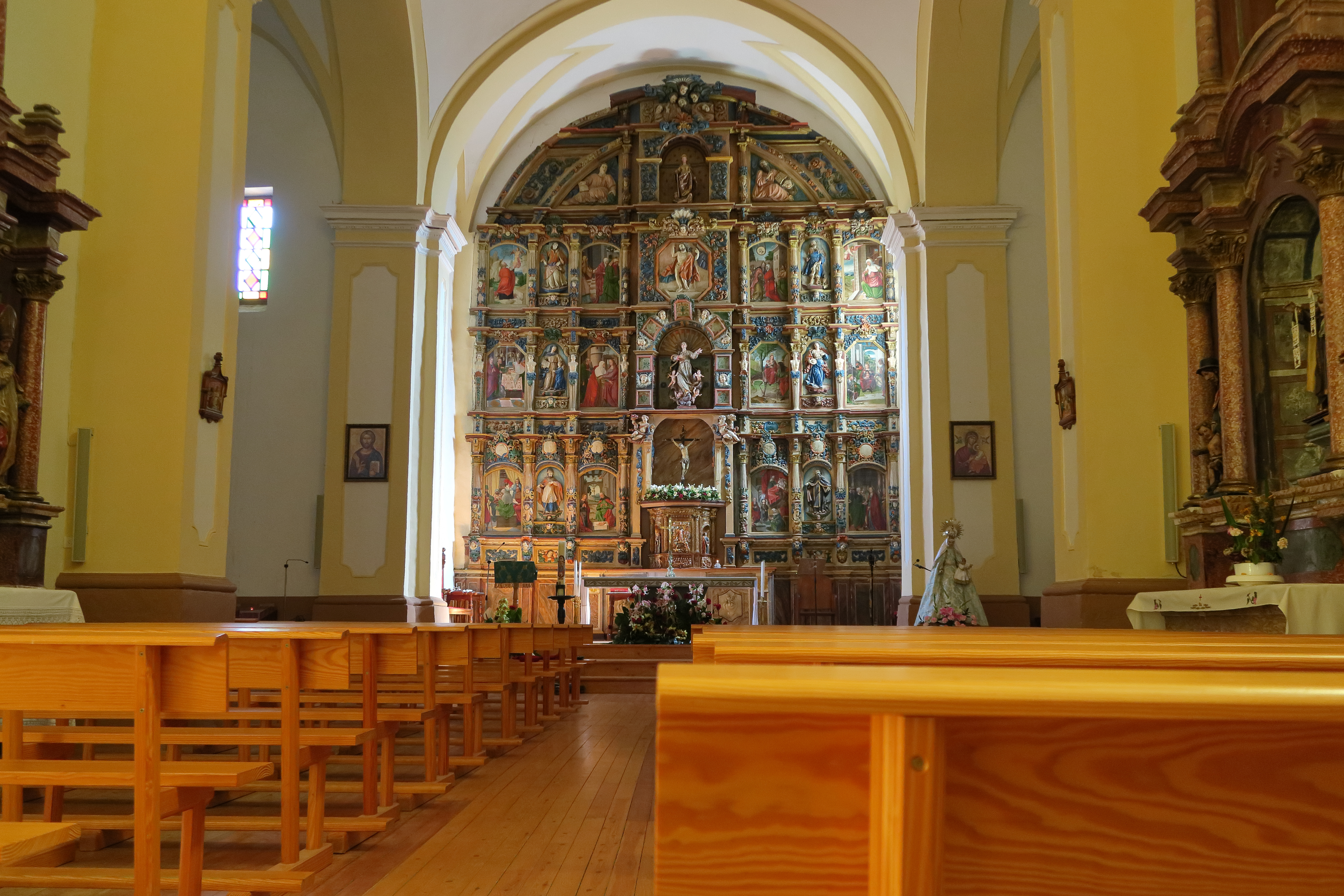 Villarrín de Campos, Iglesia de la Asunción de Nuestra Sra. Interior, 01